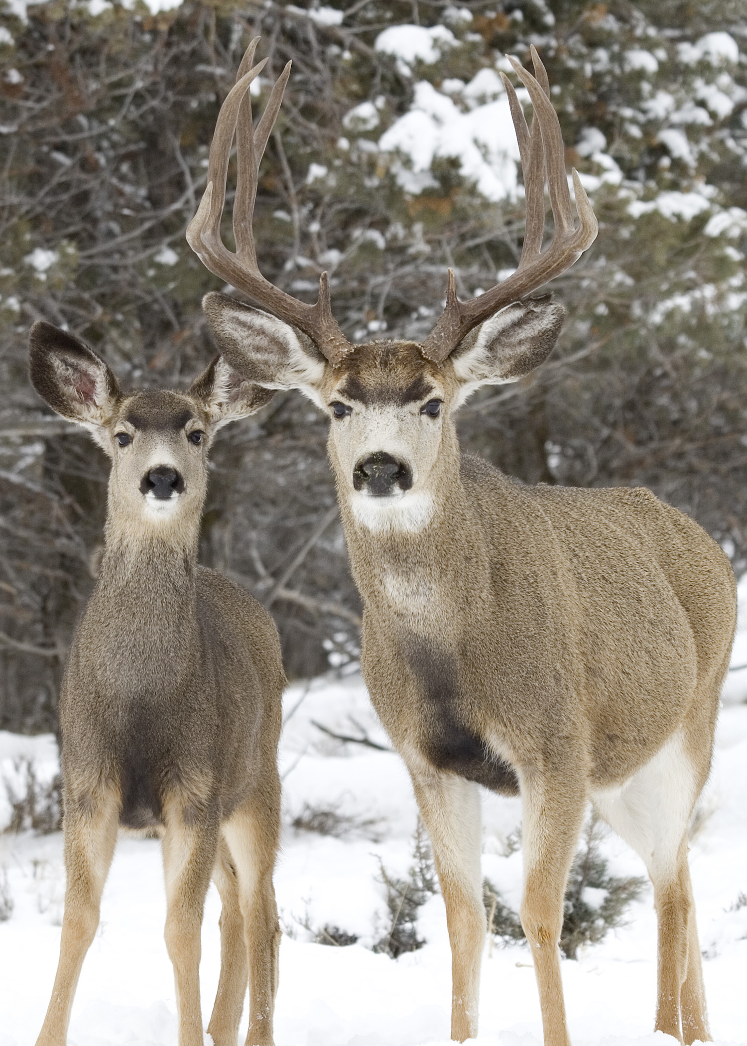 Mule deer pair at Elk Creek